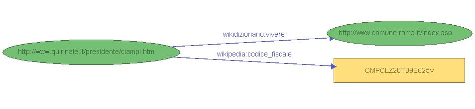 Immagine ssportata dal tool di modellazione RDF IsaViz a partire dalla formalizzazione RDF d'esempio sull'ex Presidente C.A. Ciampi (voce di Wikipedia-IT: "